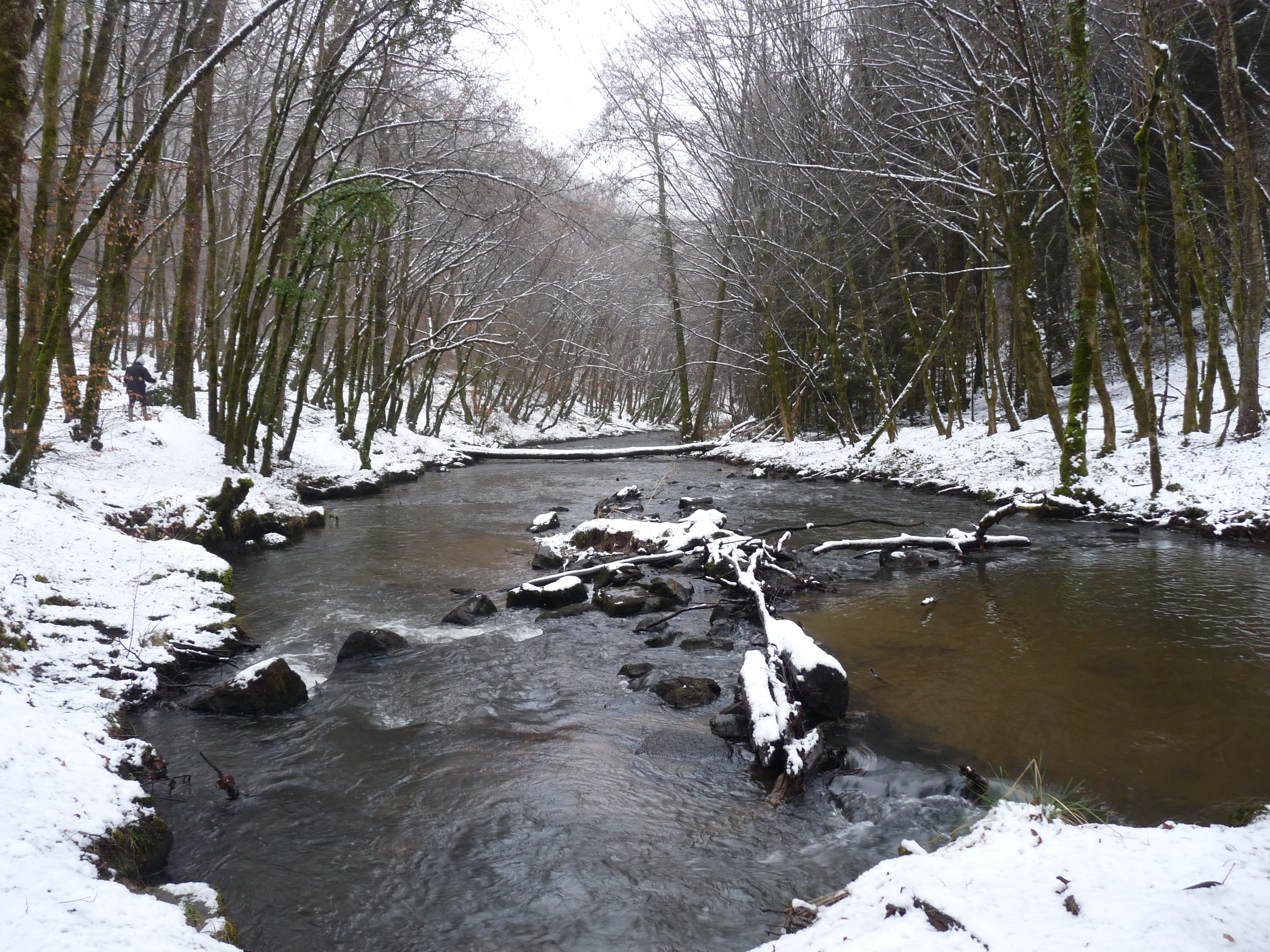 Le Brezou, affluent de la Vézère, dans la forêt de Blanchefort (Corrèze)